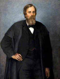 Retrat del matemàtic irlandès John Purser (1835-1903), cosí de l'autora.